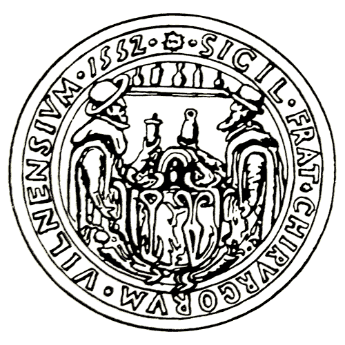 Беларуская (тарашкевіца): Пячатка віленскага цэху хірургаў